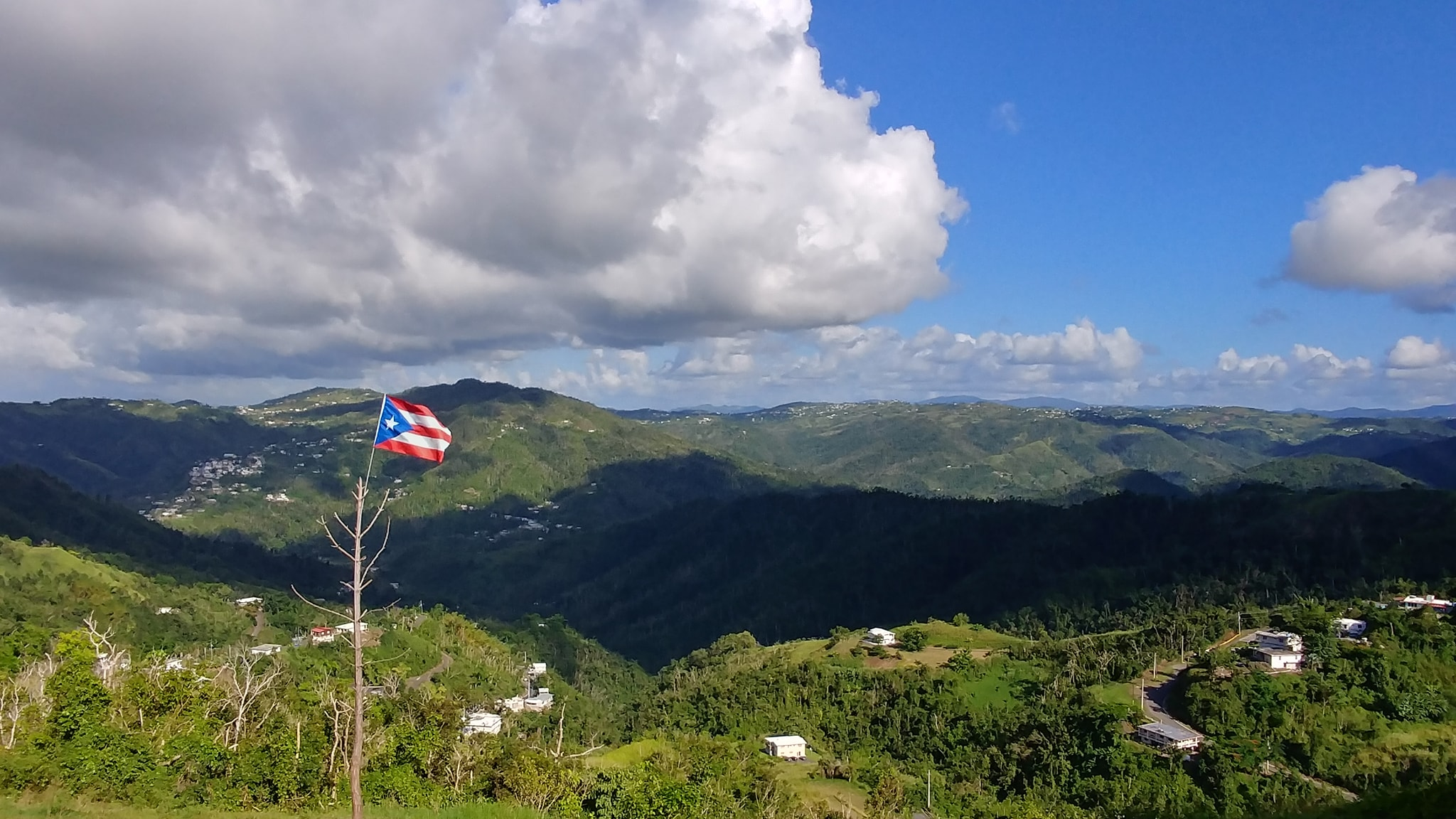 Barrio Doña Elena, Comerío, Puerto Rico (2018)